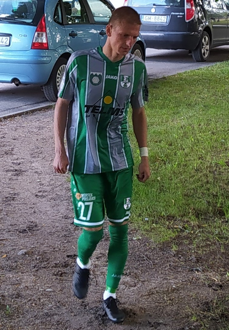 Romāns Mickevičs